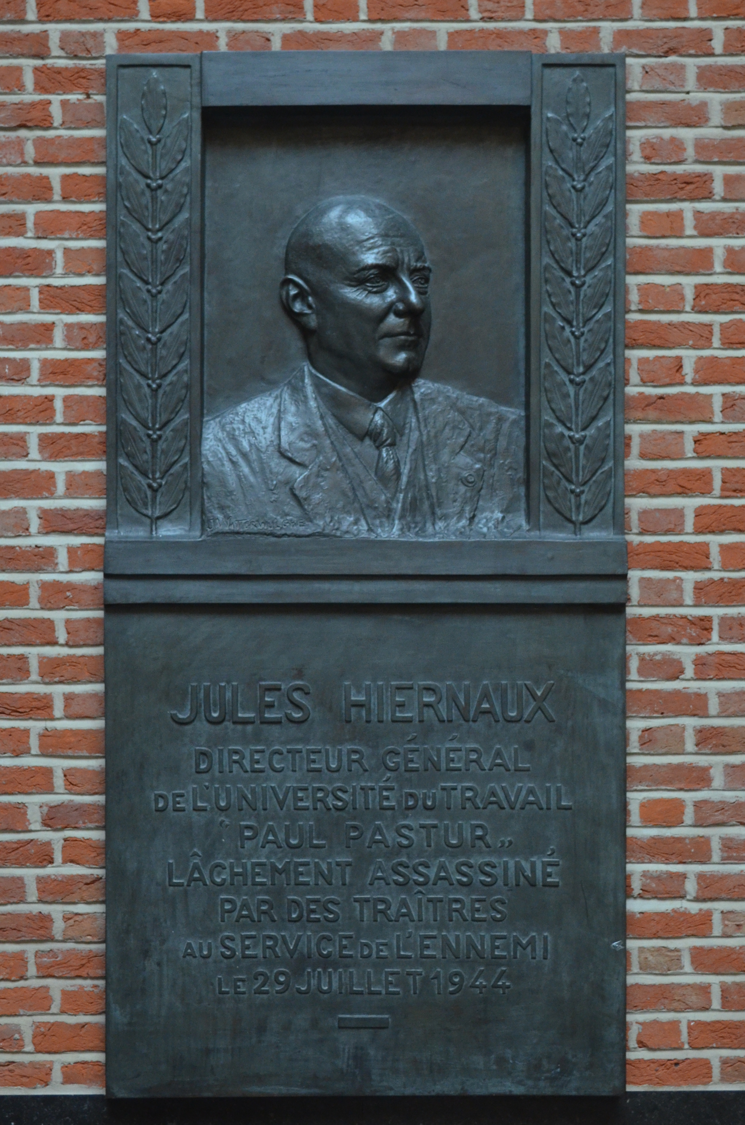 Charleroi (Belgique) - Jules Hiernaux - Atrium de la Bibliothèque de l'Université du Travail Paul Pastur.